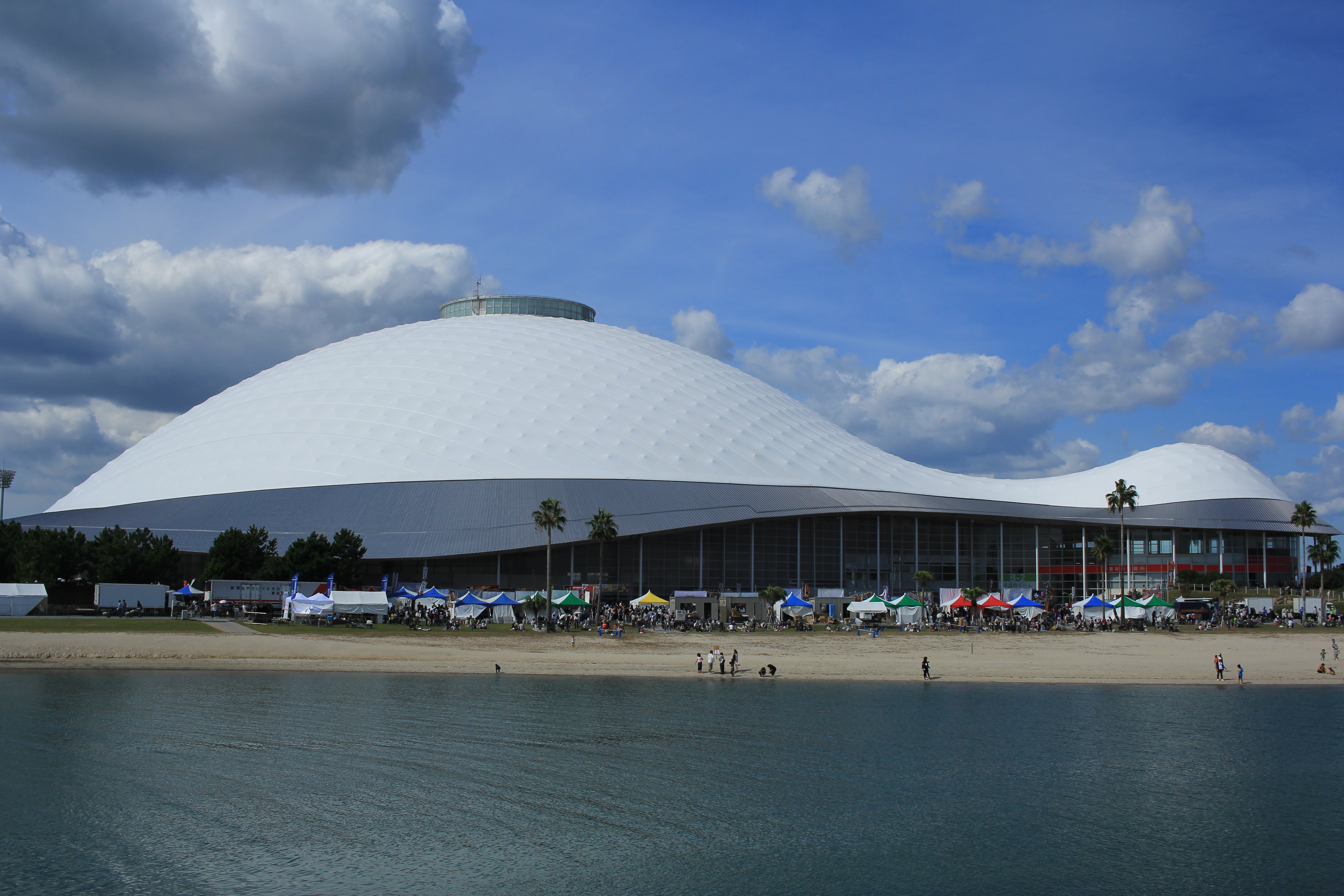 月の海から見たきらら元気ドーム Canon EOS 60D